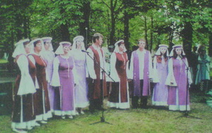 вокальный ансамбль "Асалода" Ильичёвского CДК, пос.Ильич (Рогачёвский район, Беларусь)